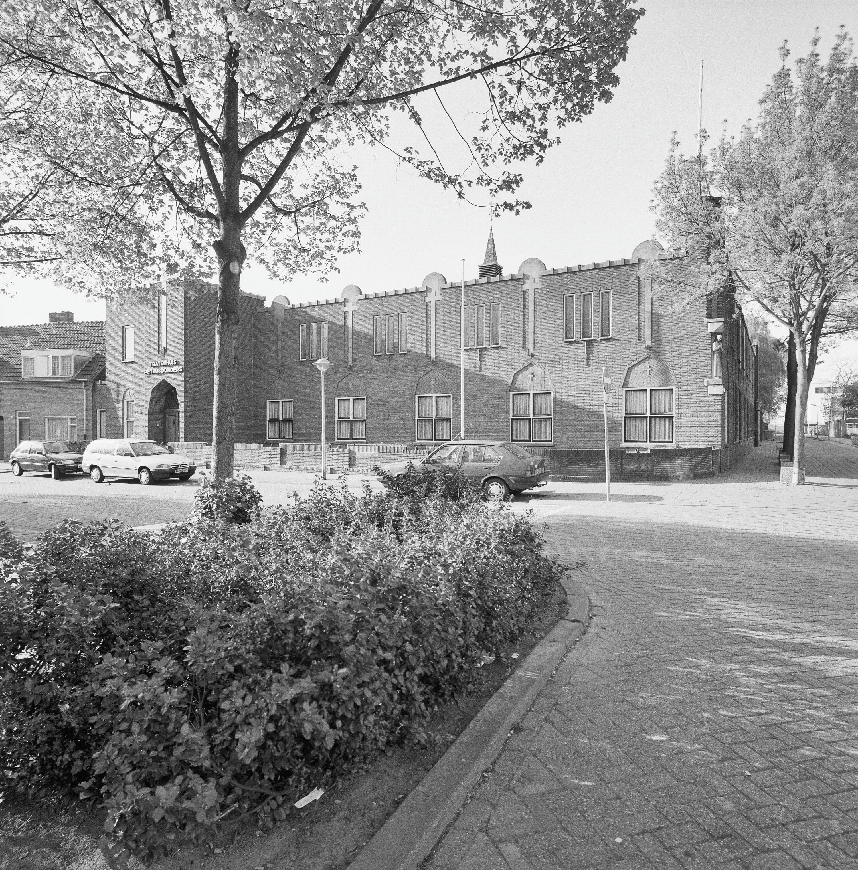 Fraterhuis Petrus Donders: Overzicht voorgevel klooster (opmerking: Gefotografeerd voor MIP Tilburg, bladzijde 75)